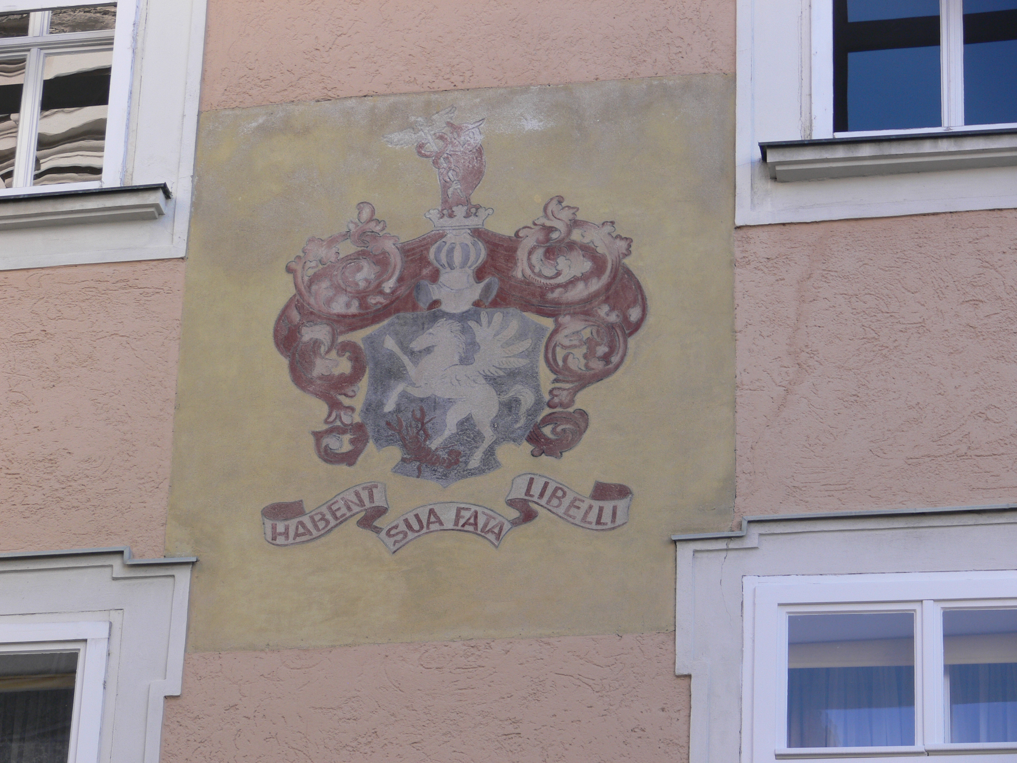 "Ritzerhaus" mit Buchhandlung Höllrigl, Sigmund-Haffner-Gasse 10 (am Durchgang zum Universitätsplatz), Salzburg: Wappen und Motto "Habent sua fata libelli"